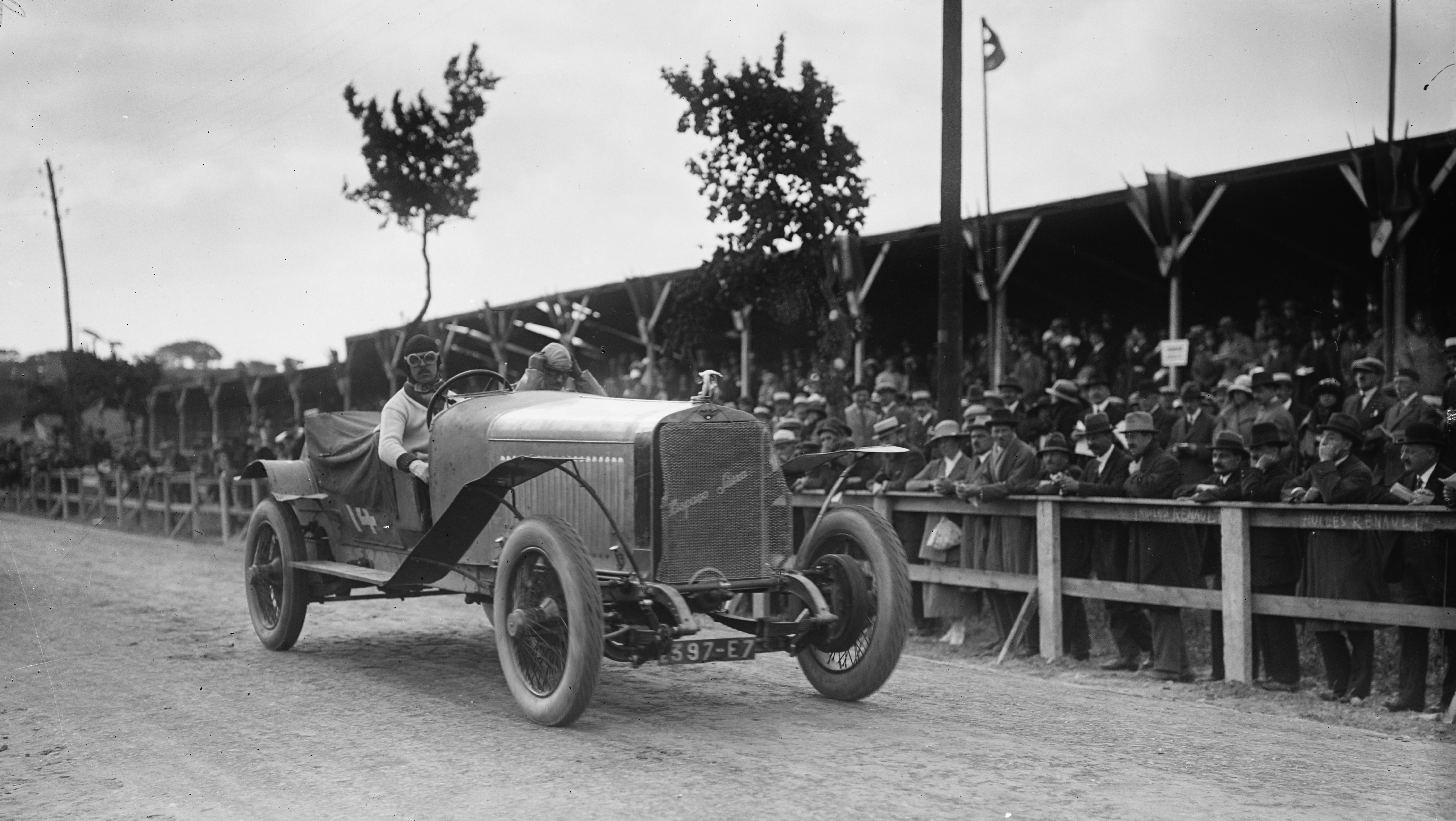 André Dubonnet vainqueur sur Hispano-Suiza de la première coupe Georges Boillot à Boulogne-sur-Mer le 2 juillet 1921